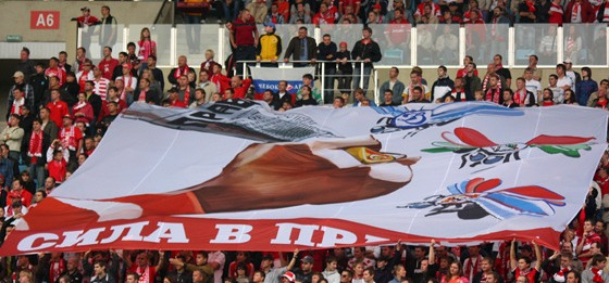 Баннер "Сила в правде" на матче с "Динамо" в Химках. 2009 год